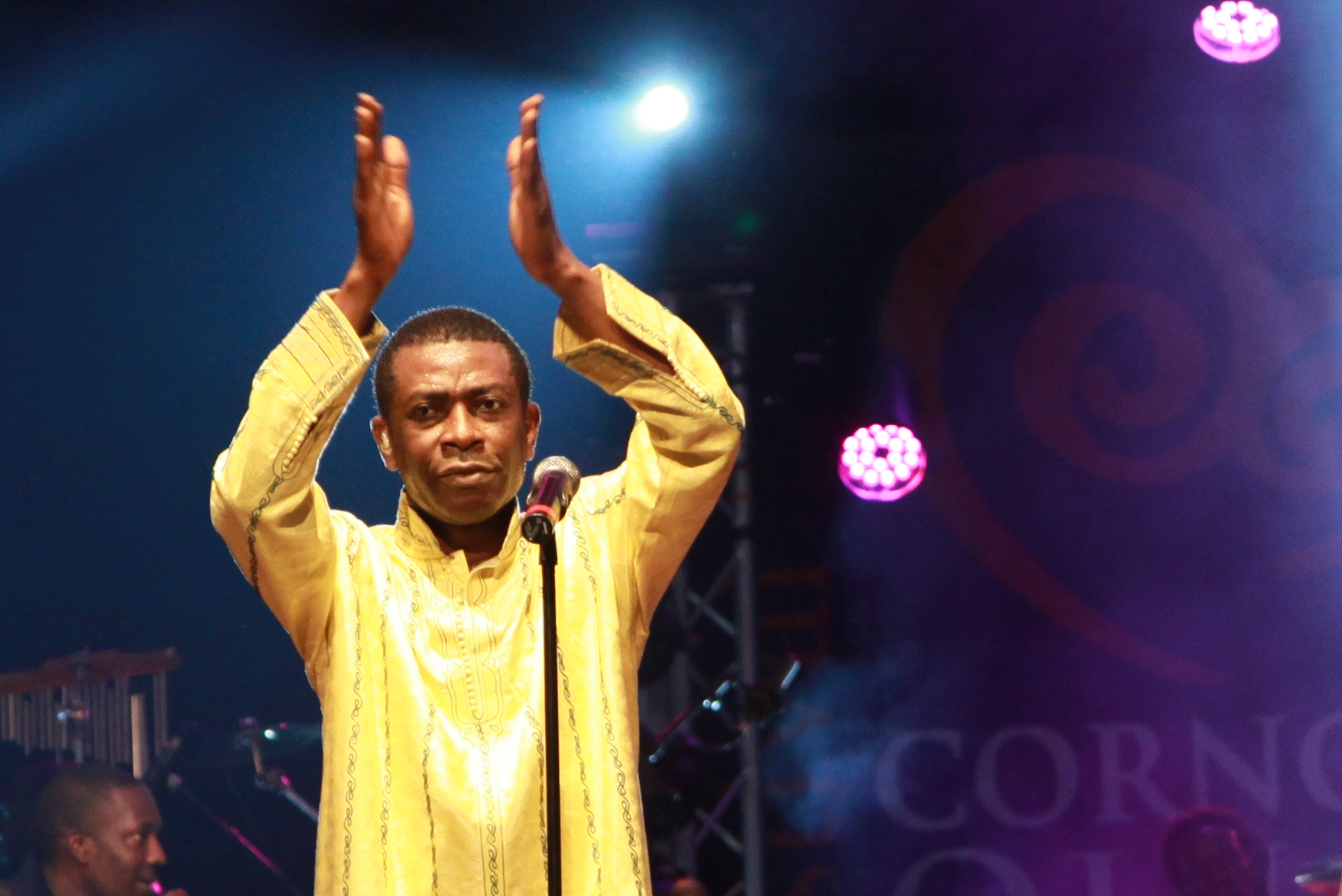 Youssou N'Dour en concert au festival de Cornouaille de Quimper le 25 juillet 2010 à l'espace Gradlon.